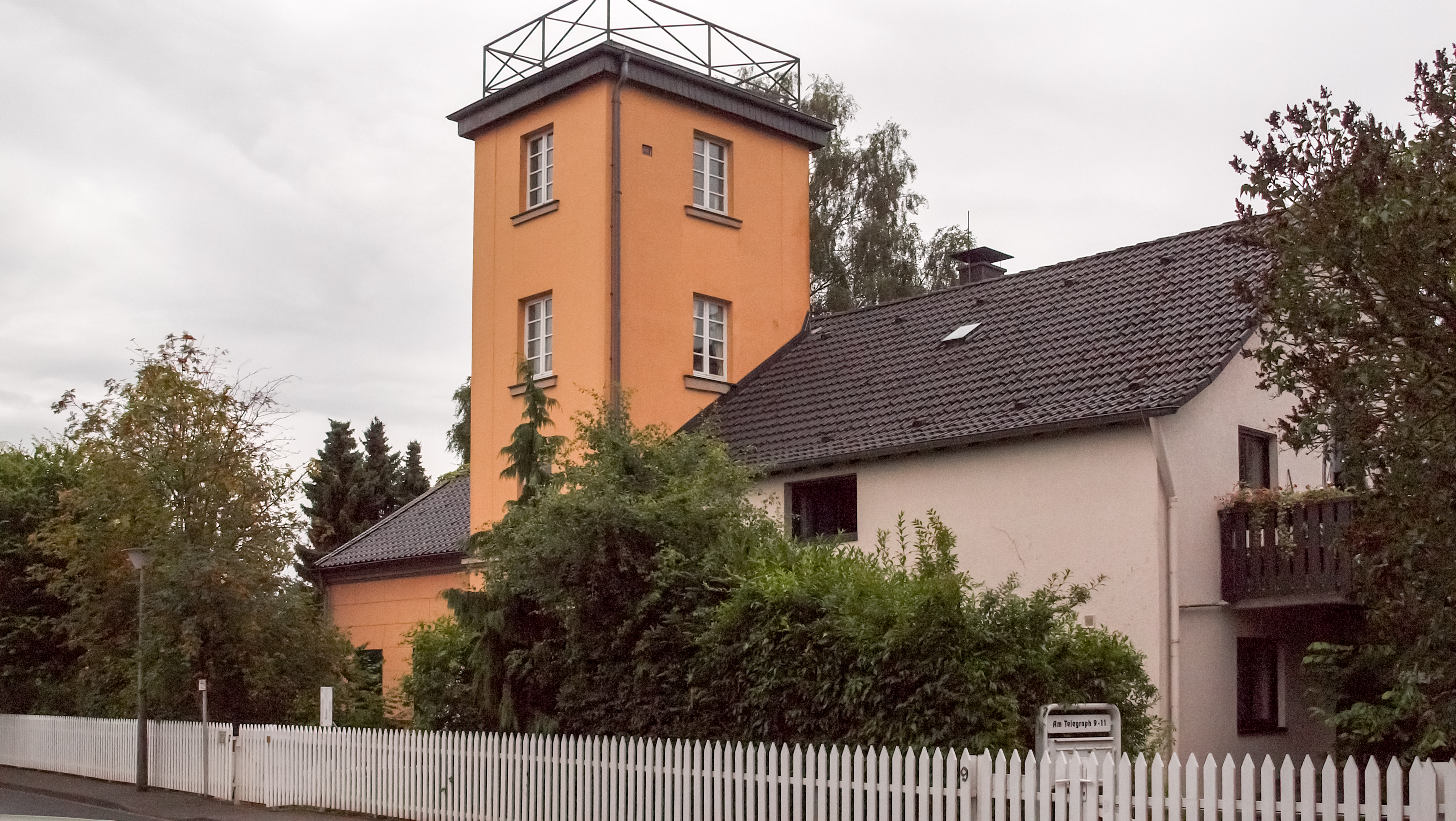 Wohngebäude Am Telegraph 7 in der ehemaligen Telegrafenstation „Haus Telegraph“, Söven, Hennef (Sieg)